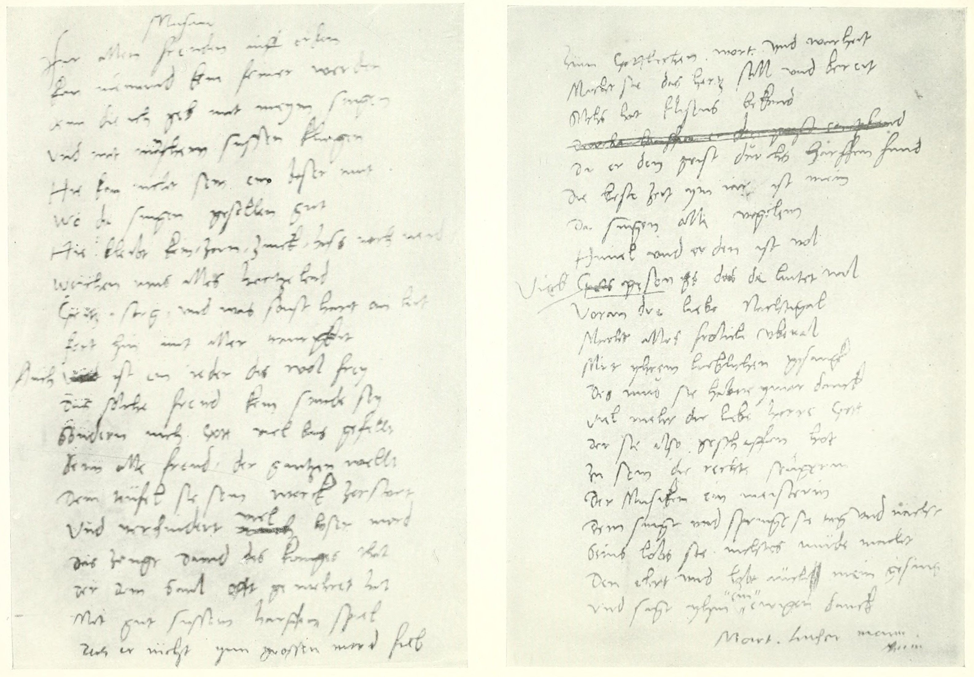 Autograph Martin Luthers mit dem Text des Gedichtes "Musica", das 1538 unter dem Titel "Frau Musica" erstmals in Johann Walters Werk "Lob vnd preis der loblichen Kunst Musica" publiziert wurde. Vorliegender Scan ist der Weimarer Gesamtausgabe der Werke Luthers entnommen, in welcher die Abbildung wiederum nicht direkt vom Original stammt, sondern die Reproduktion einer Zinkografie aus dem 19. Jahrhundert ist